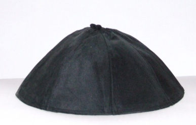 cierne solideo